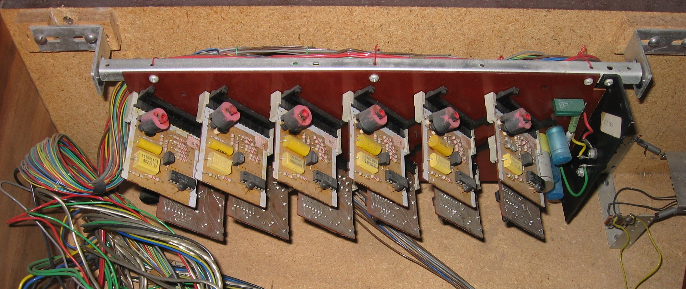 Die 12 Tongeneratoren der Philicorda GM760 mit T-Flipflop Arrays (Digitalzähler) für die Oktaven